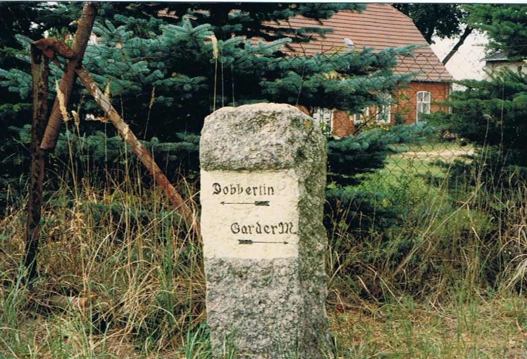 Wegweiserstein nahe der Garder Mühle am Abzweig Kläden und Altenhagen im Westen der Schwinzer Heide.